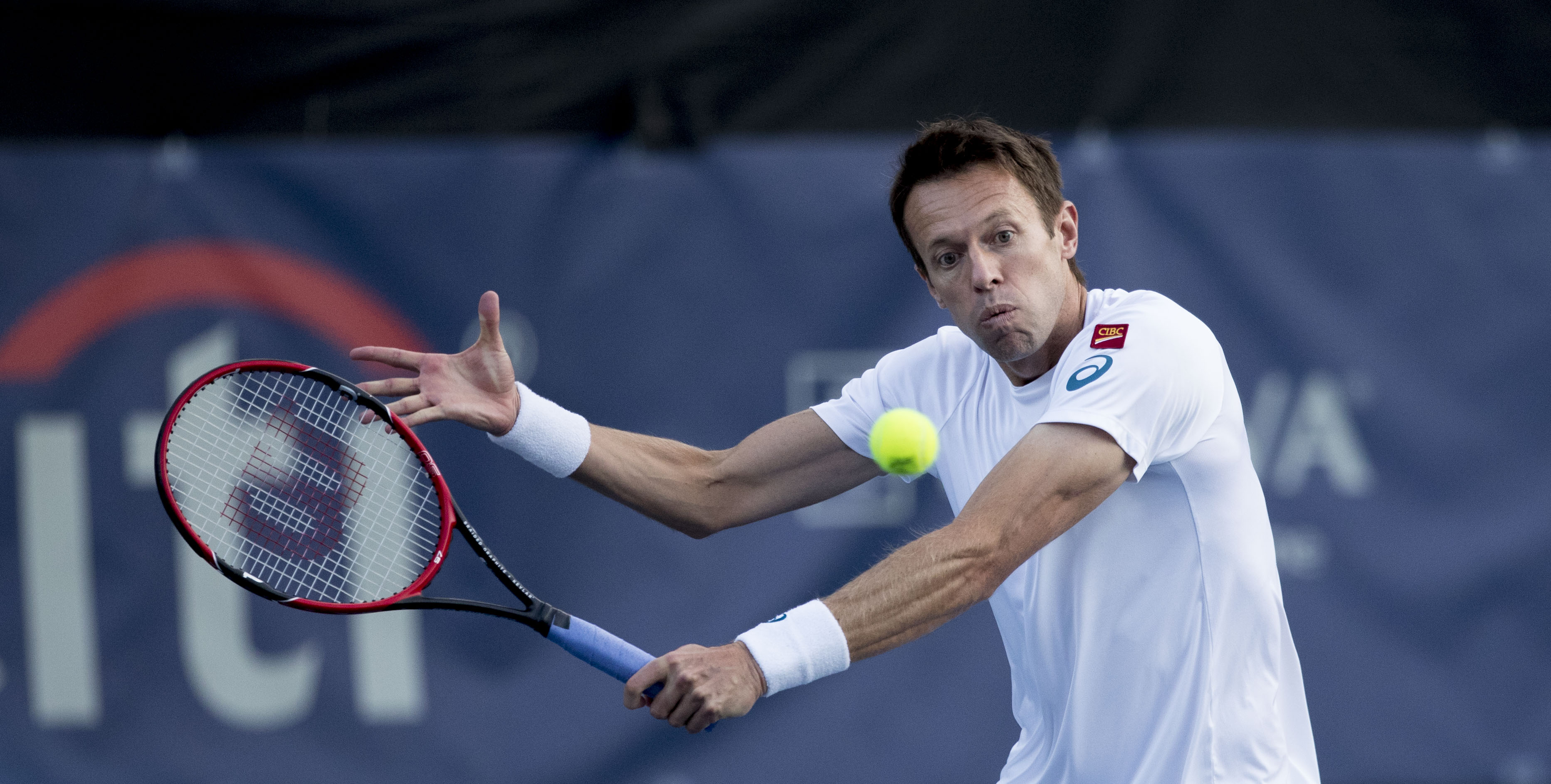 2016 Citi Open